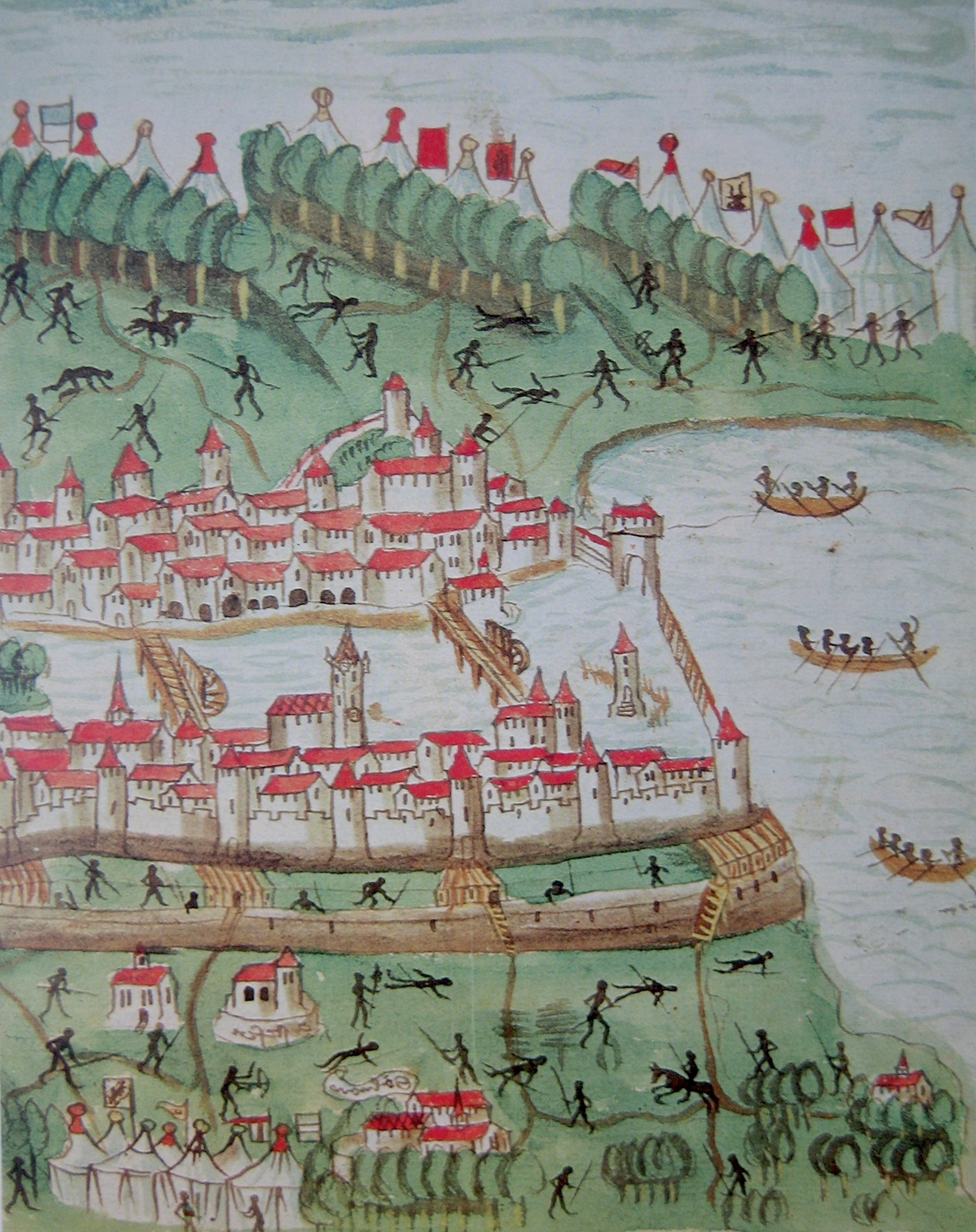 Aus der Chronik von Gerold Edlibach: Die Eidgenossen 1444 vor Zürich im Alten Zürichkrieg. Ansicht von W nach O als nicht konsequent durchgeführtes Spiegelbild; alle Namen von rechts nach links geschrieben, Stellung der Grossmünstertürme und der Kirchen der linksufrigen Stadt unrichtig. Schöpfräder an der flussaufwärts gerichteten Seite der Brücken. Originale seitenverkehrte Abbildung siehe hier